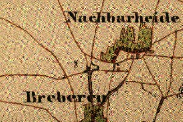 Preußische Kartenaufnahme 1846 -Uraufnahme- (Gangelt)